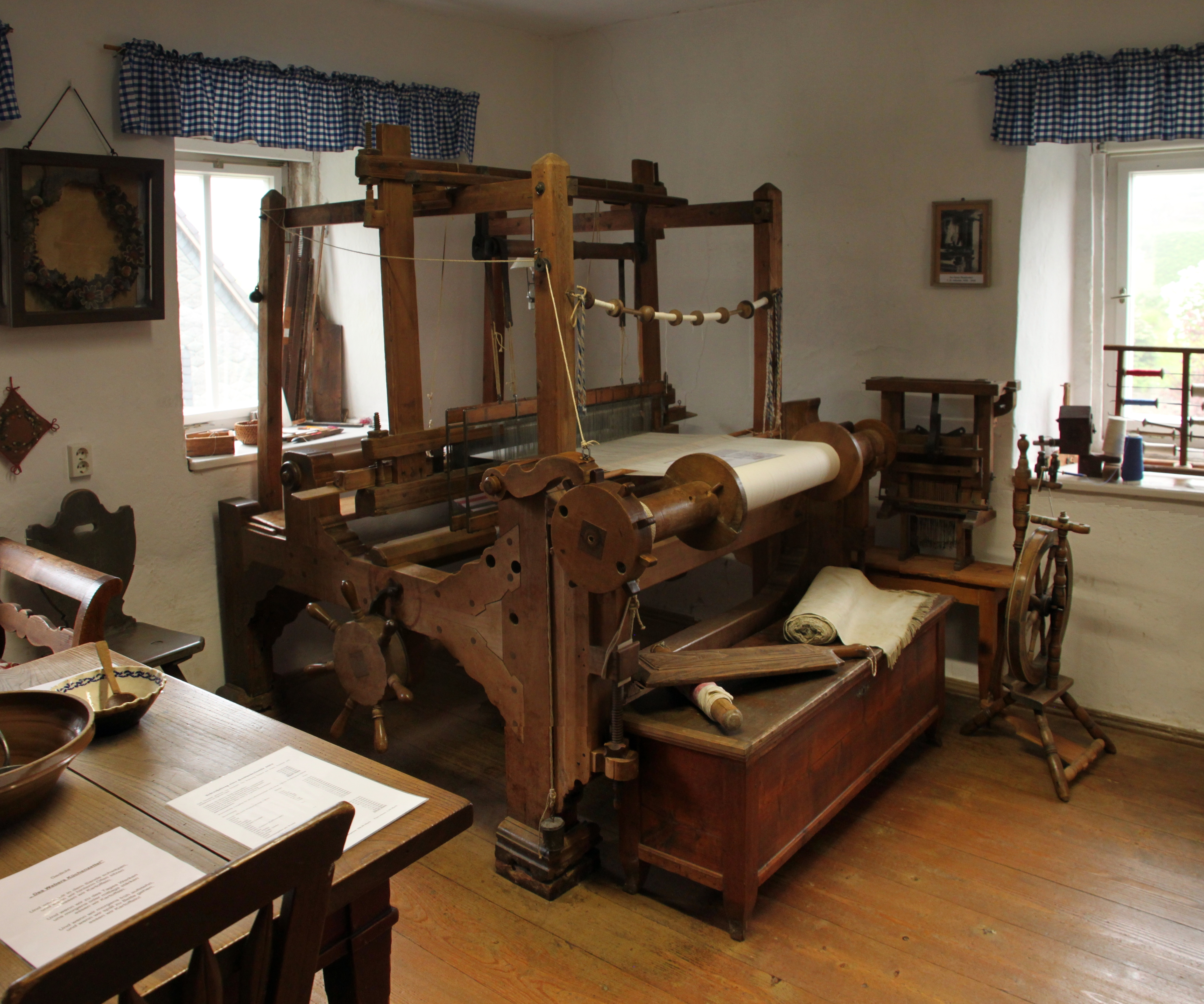 Waltersdorf (Großschönau): Webstuhl im Volkskunde- und Mühlenmuseum in der Mittelmühle. Die Mühle entstand wahrscheinlich um 1400. Sie wurde 1614/15 als Steinbau neu errichtet und arbeitete später als Getreidemühle, Bäckerei, Schrotmühle und Sägewerk. Der Betrieb wurde 1955 eingestellt, ein Jahr später wurde hier das Heimatmuseum (heute Volkskunde- und Mühlenmuseum) eingerichtet. (Dorfstraße 89, Denkmal-Nr. 09270820)